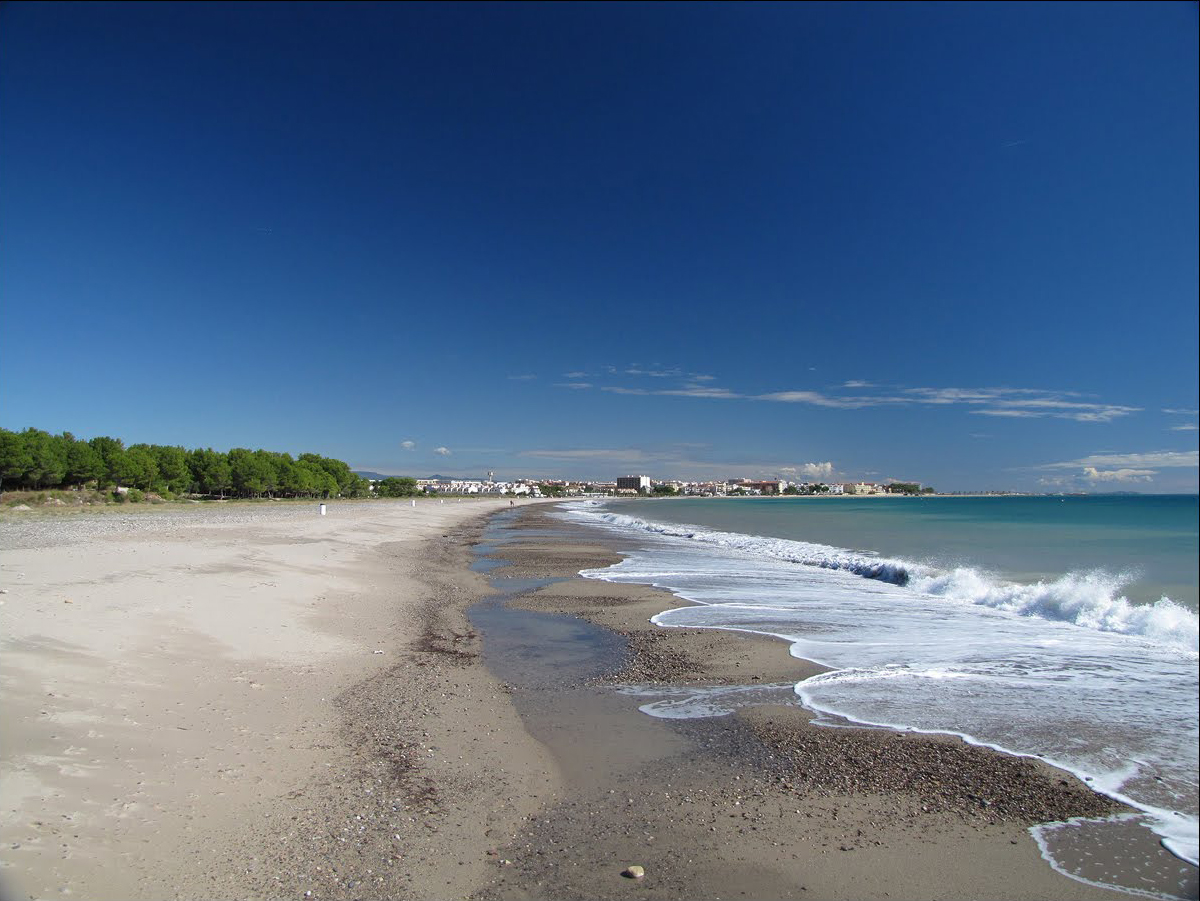 Platja de l'Arenal